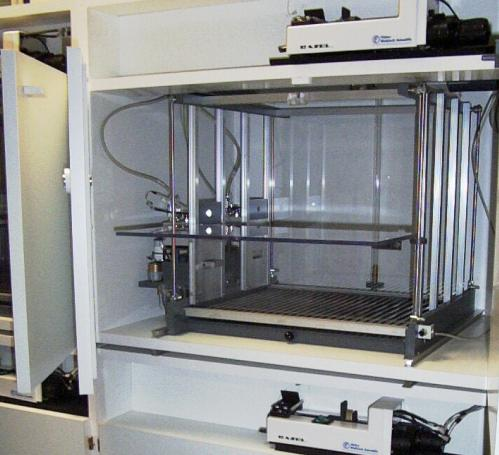 Skinner box for rat